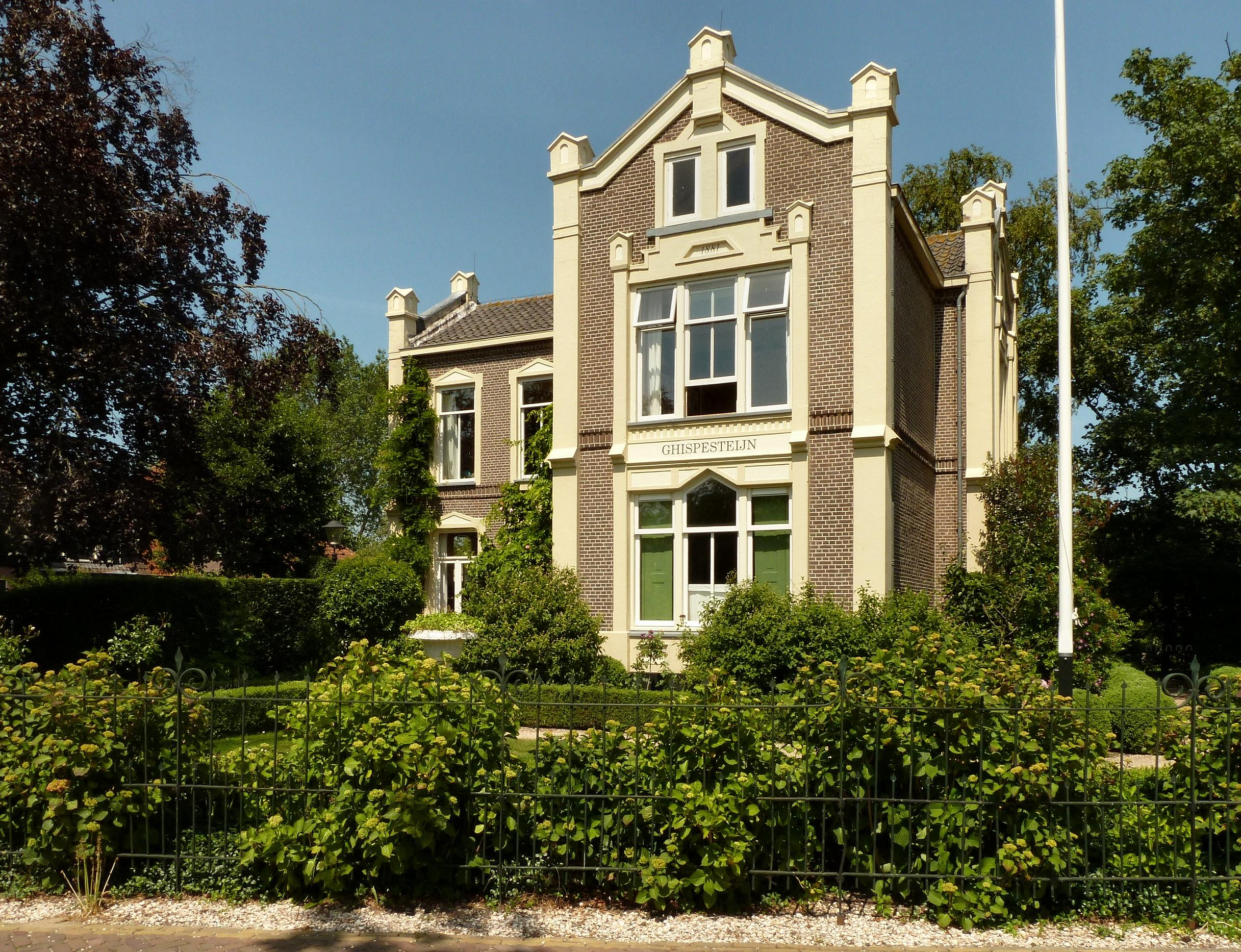 Maison classée au titre de Rijksmonument dans le village de Jisp (Hollande-Septentrionale).